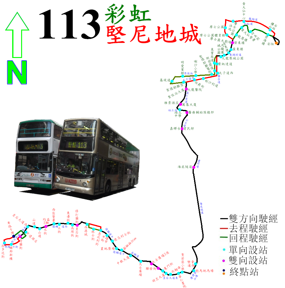 中文（香港）: 過海隧巴113路的走線圖